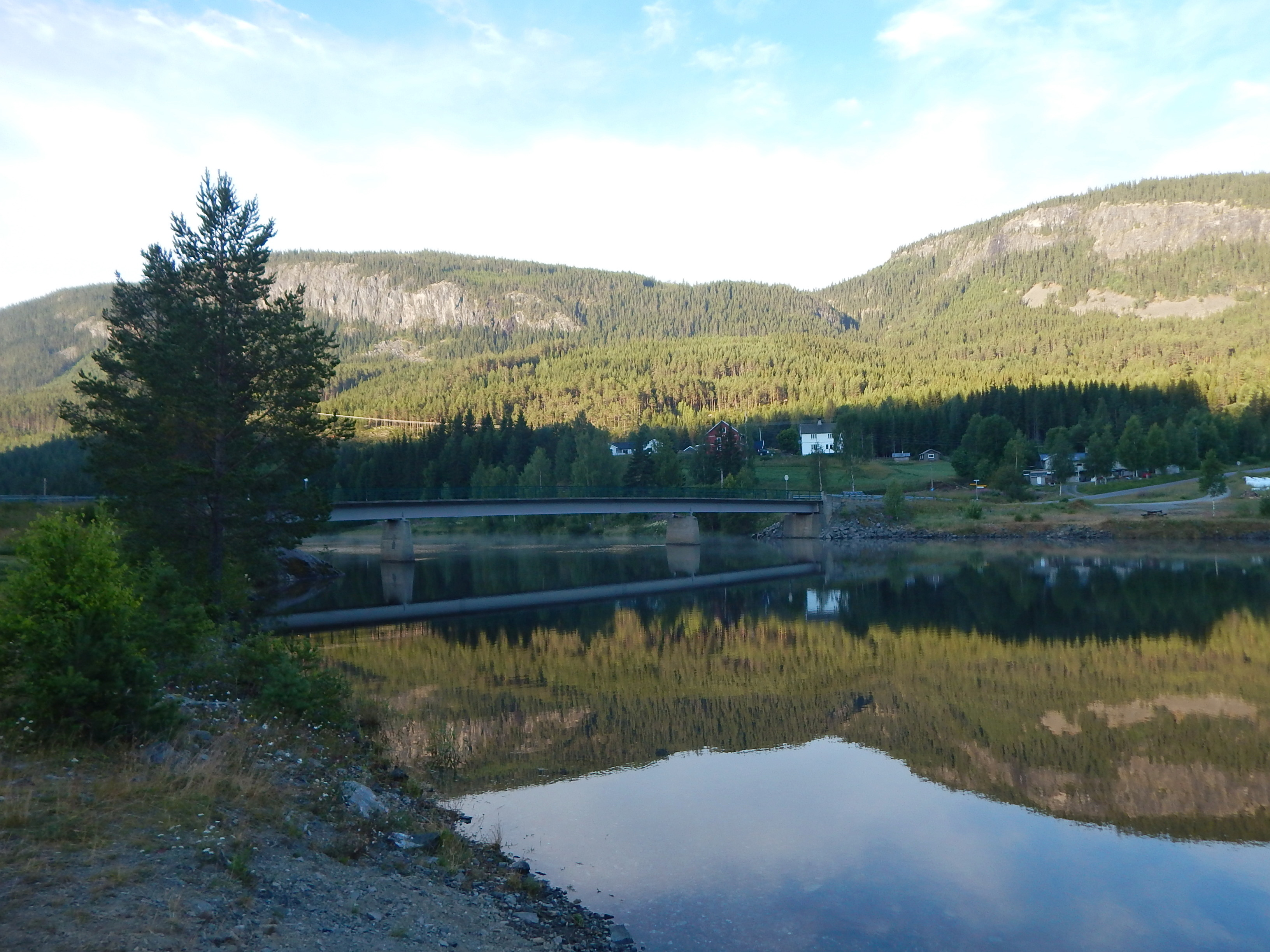 En arm av FV2446 (tidl. FV220) går over Sundvoll bru ved Dokkafjorden og til Aurdal.